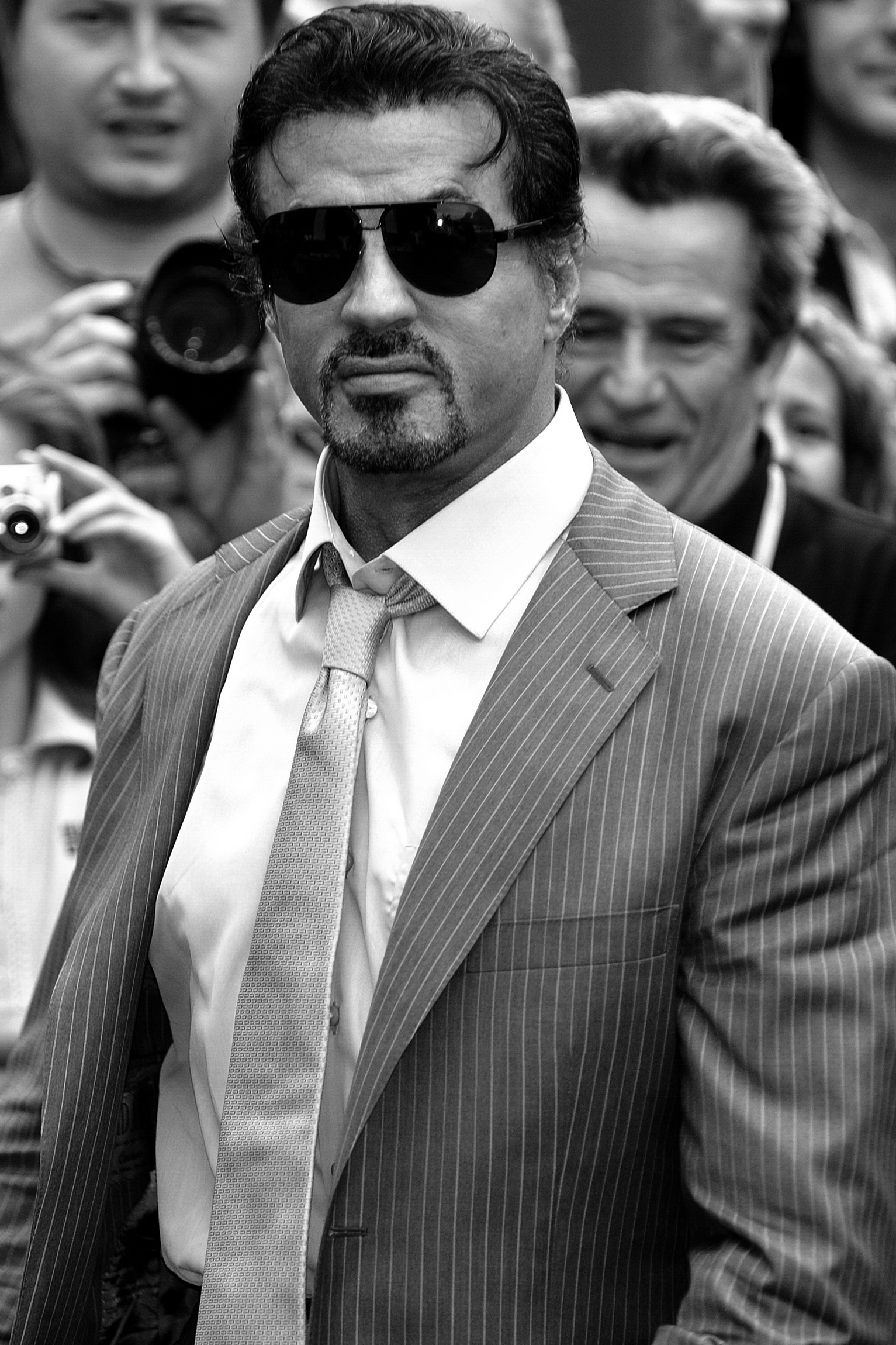 66ème Festival de Venise (Mostra) Sylvester Stallone